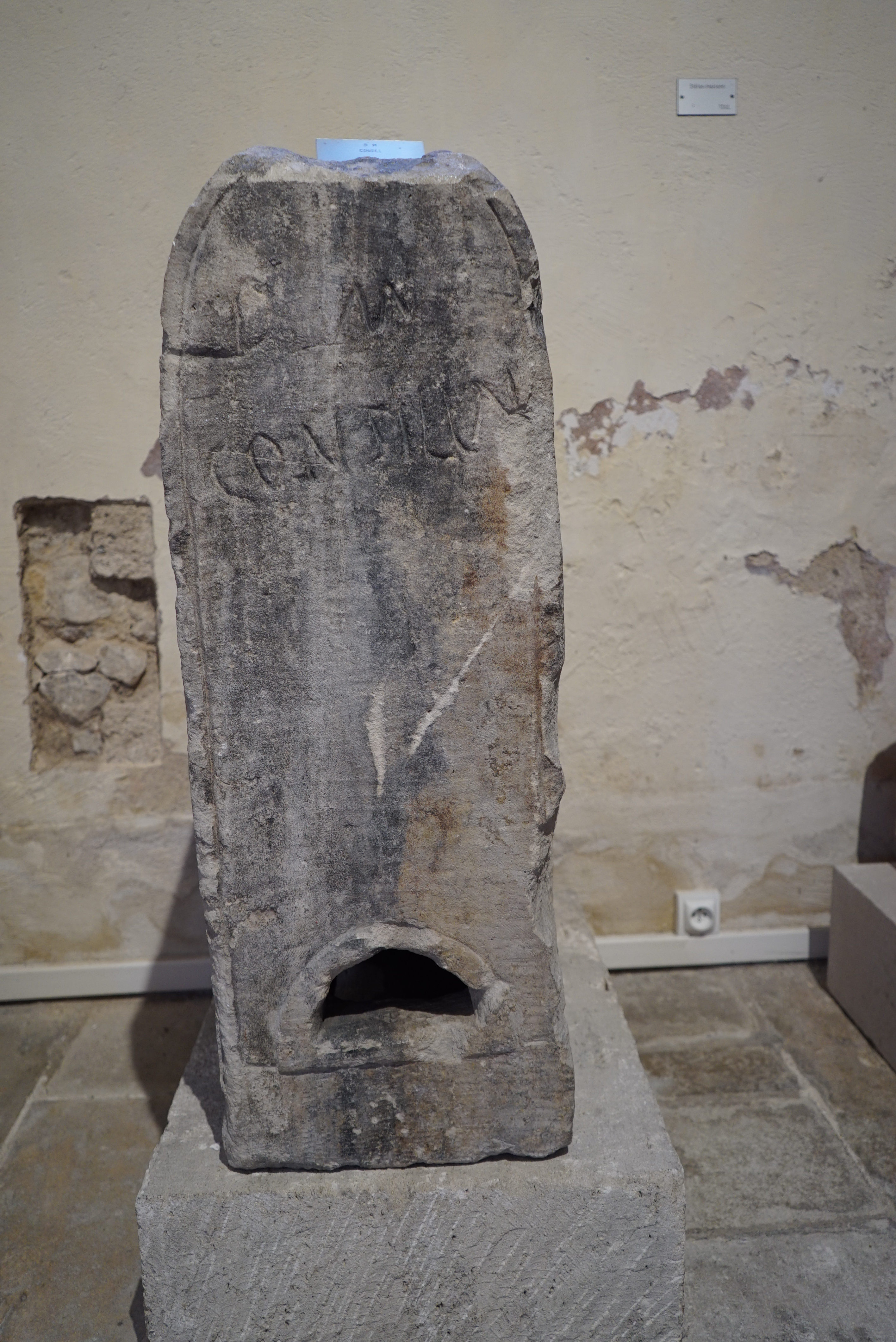 Musée d'art et d'histoire de Toul.